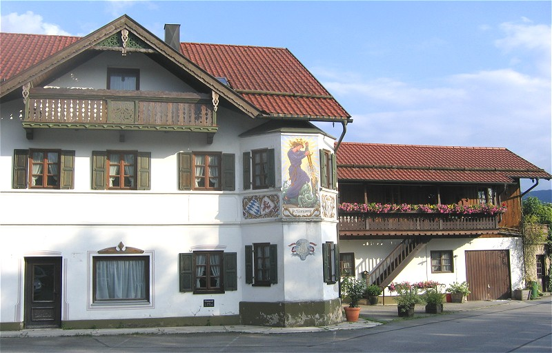 Nußdorf am Inn, Am Ring 6